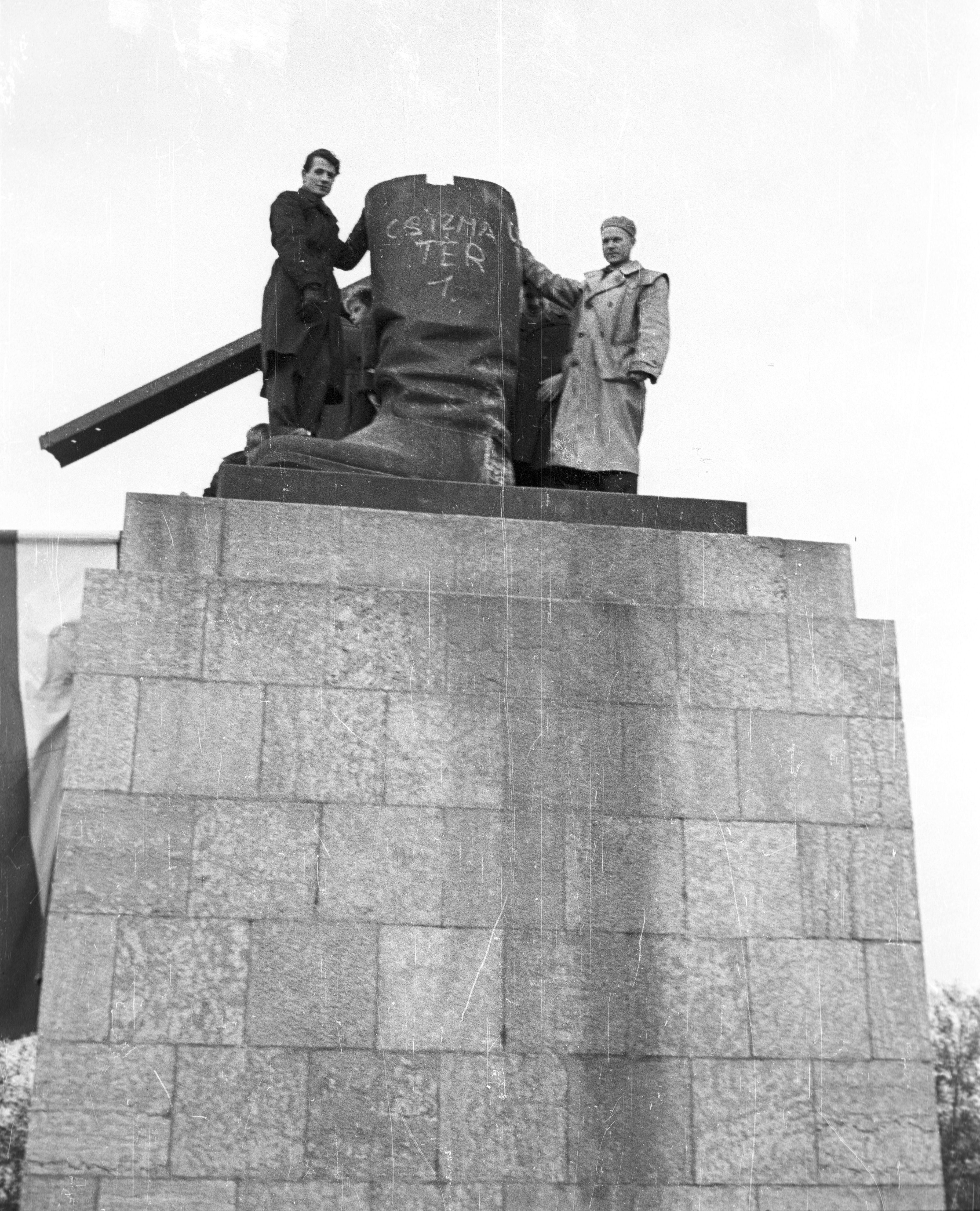 Ötvenhatosok tere (Sztálin tér), a Sztálin szobor maradványa. Location: Hungary, Budapest XIV. Tags: Csizma square, Budapest, revolution Title: Ötvenhatosok tere (Sztálin tér), a Sztálin szobor maradványa.